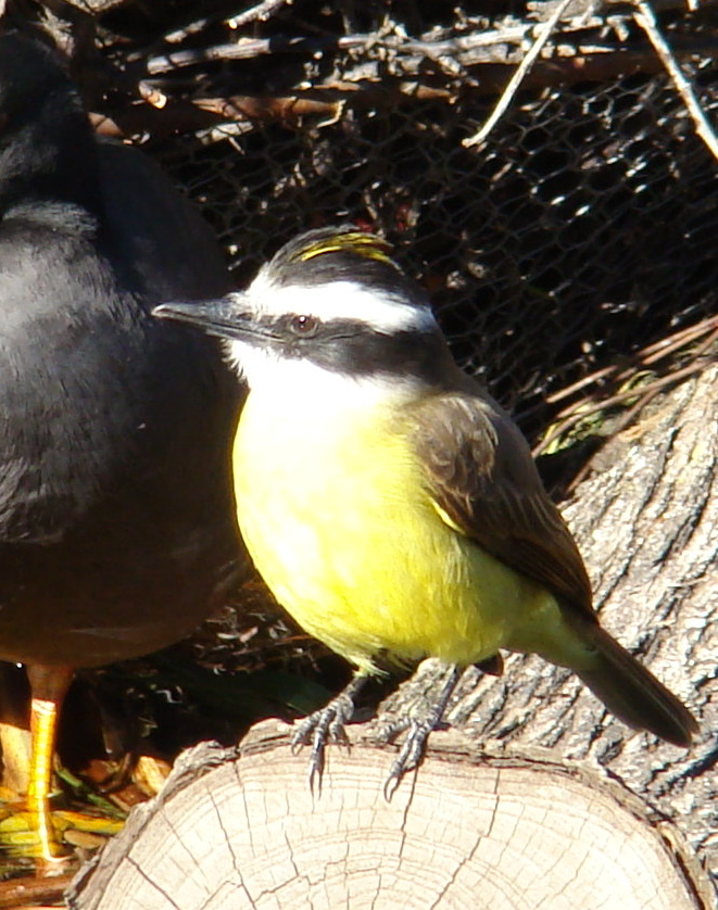 benteveo en Buenos Aires